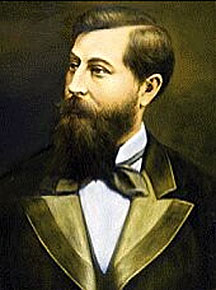 Portrait de Léo Delibes, compositeur francais